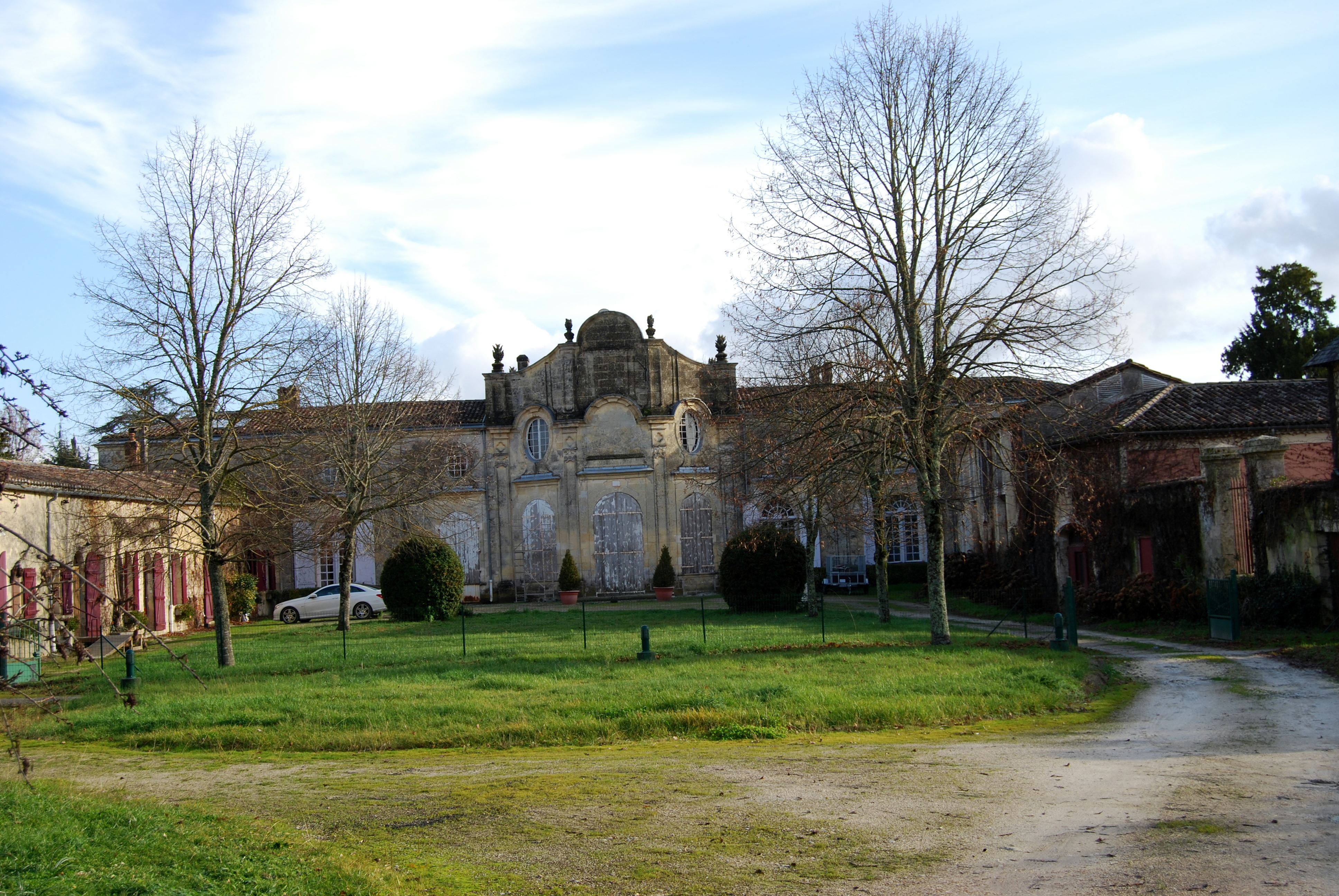 Château de Beauséjour, (Inscrit, 1990) .